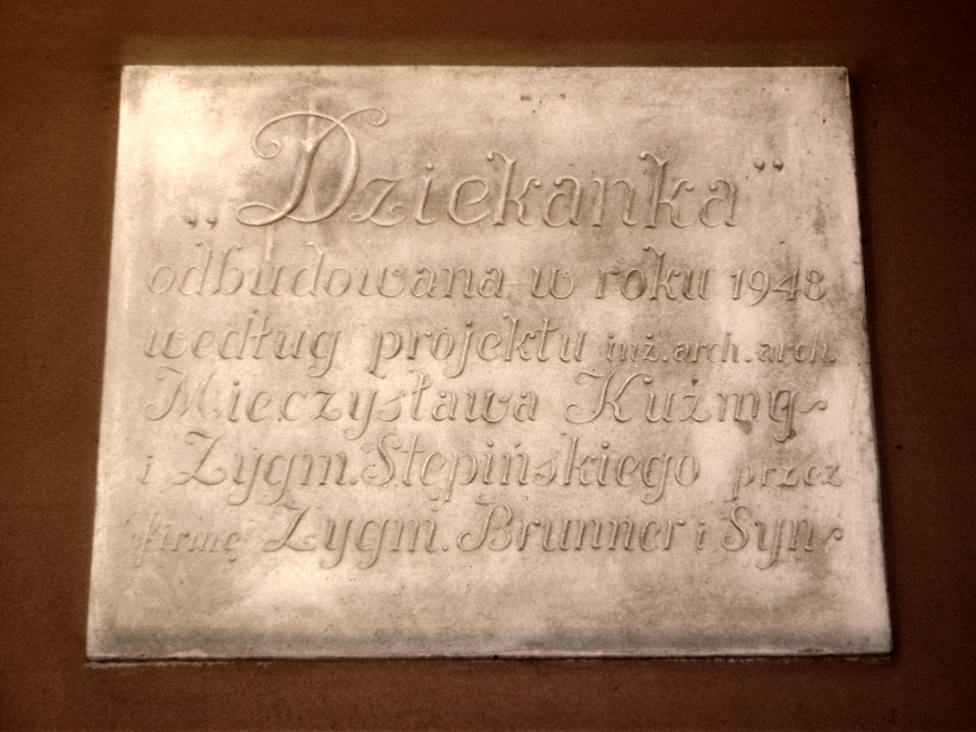 DZIEKANKA - tablica informacyjna (odbudowa)